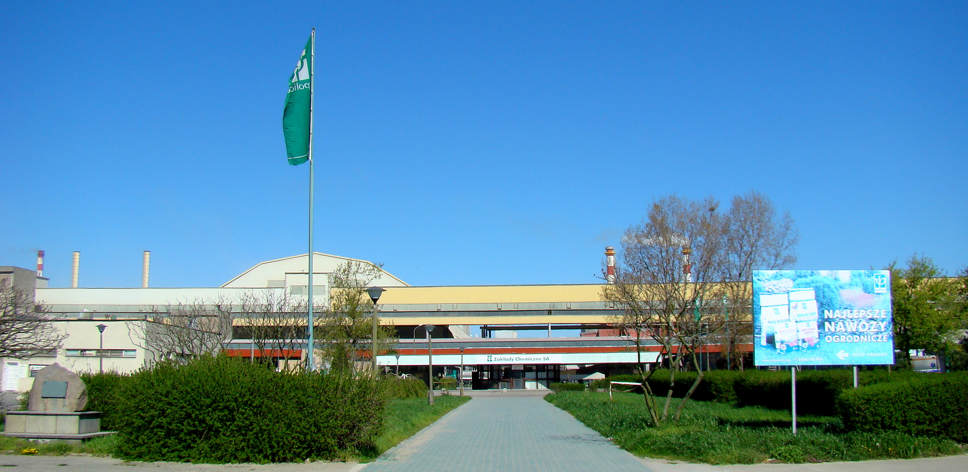 Zakłady Chemiczne Police, zakład, (Police, Województwo zachodniopomorskie), Polska